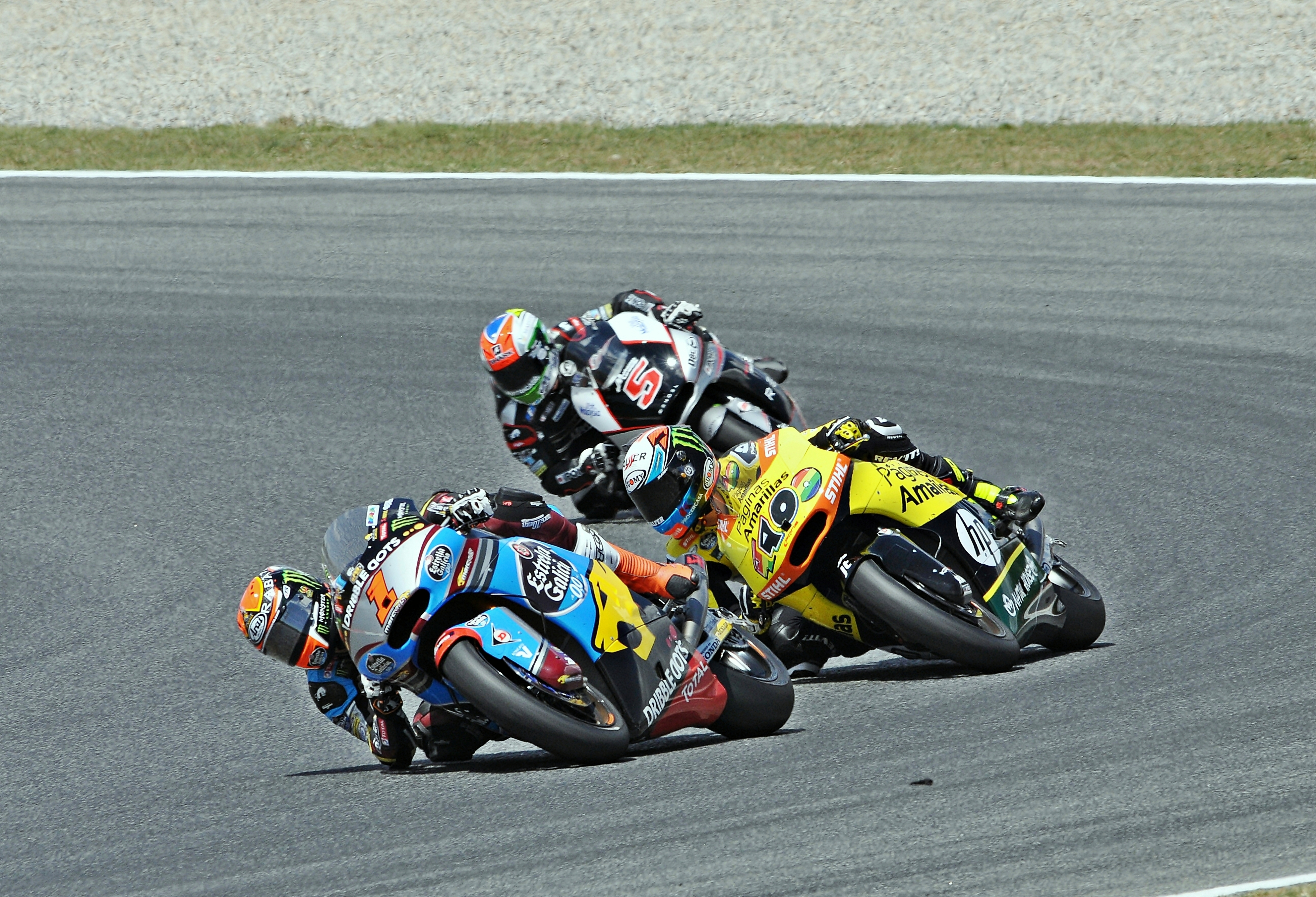 gran premio de cataluña